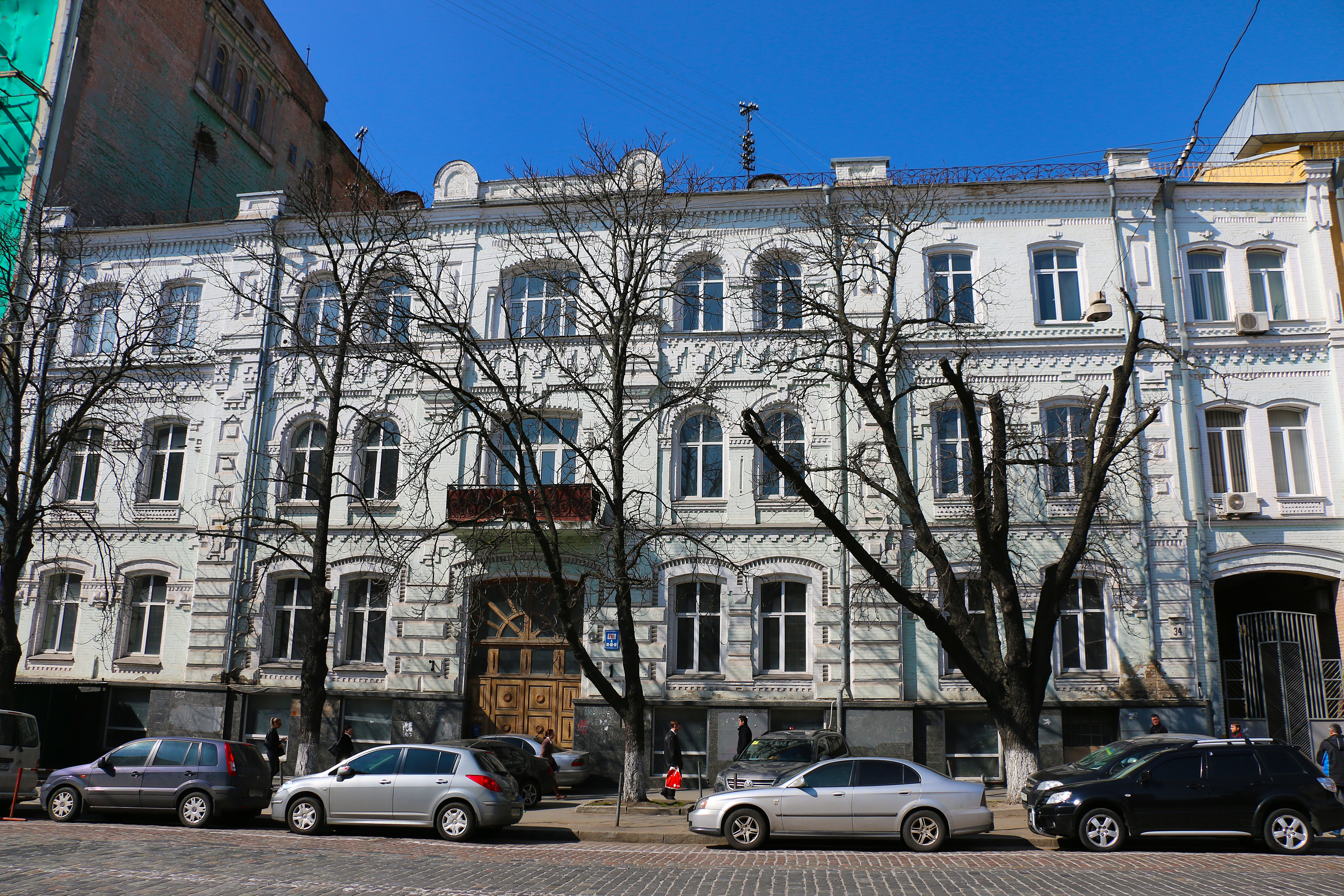 Будинок житловий, в якому у 1880-х рр. проживав відомий терапевт В. П. Образцов, у 1910-х рр. містилася редакція газети «Чехословянин», Київ, Володимирська вул., 34